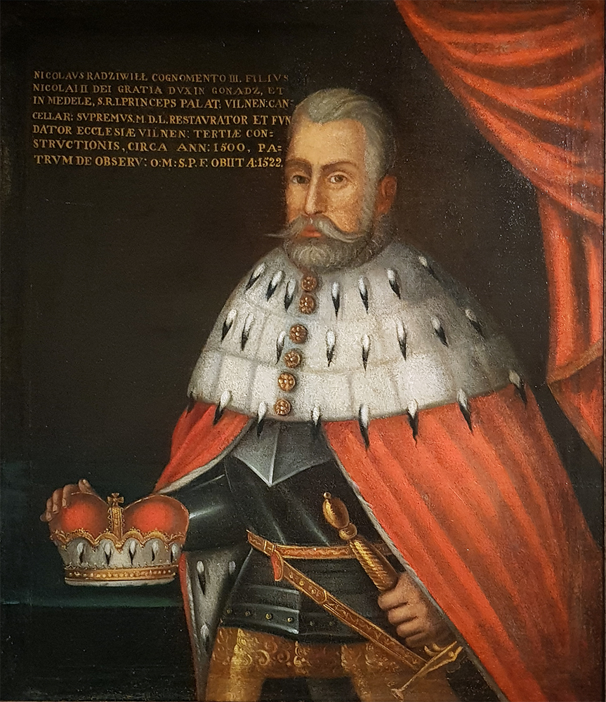 Беларуская (тарашкевіца): Партрэт Мікалая Радзівіла «Амора» (Mikałaj Radzivił «Amor»)